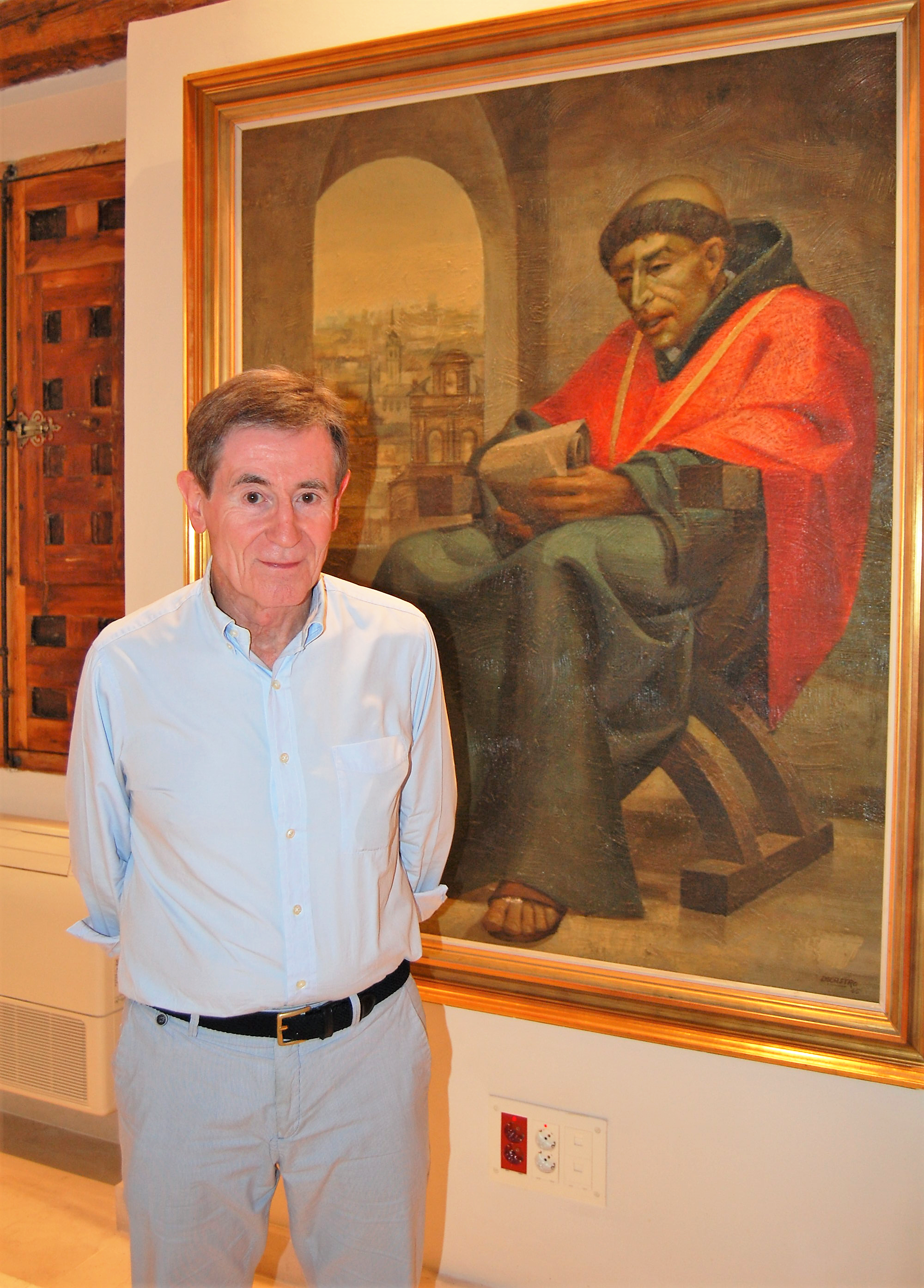 Retrato de José Félix Huerta Velayos, presidente de la Sociedad de Condueños. Fotografía tomada en el Museo de la Sociedad de Condueños en Alcalá de Henares (Comunidad de Madrid - España).